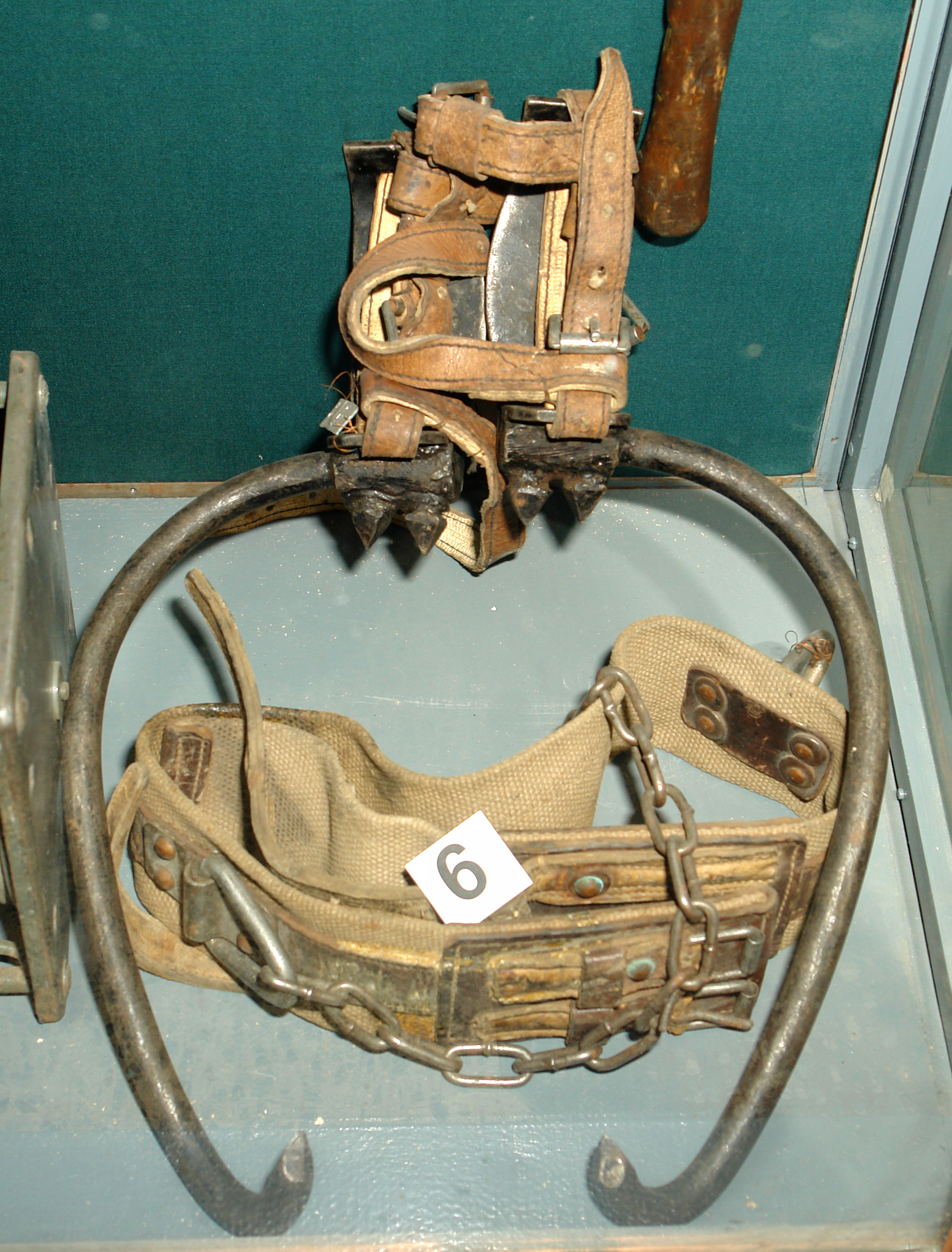 КОГТИ И ПОЯС МОНТАЖНЫЙ ЛИНЕЙНОГО НАДСМОТРЩИКА. Военно-исторический музей артиллерии, инженерных войск и войск связи, Санкт-Петербург.